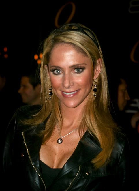 Inés Sainz Gallo